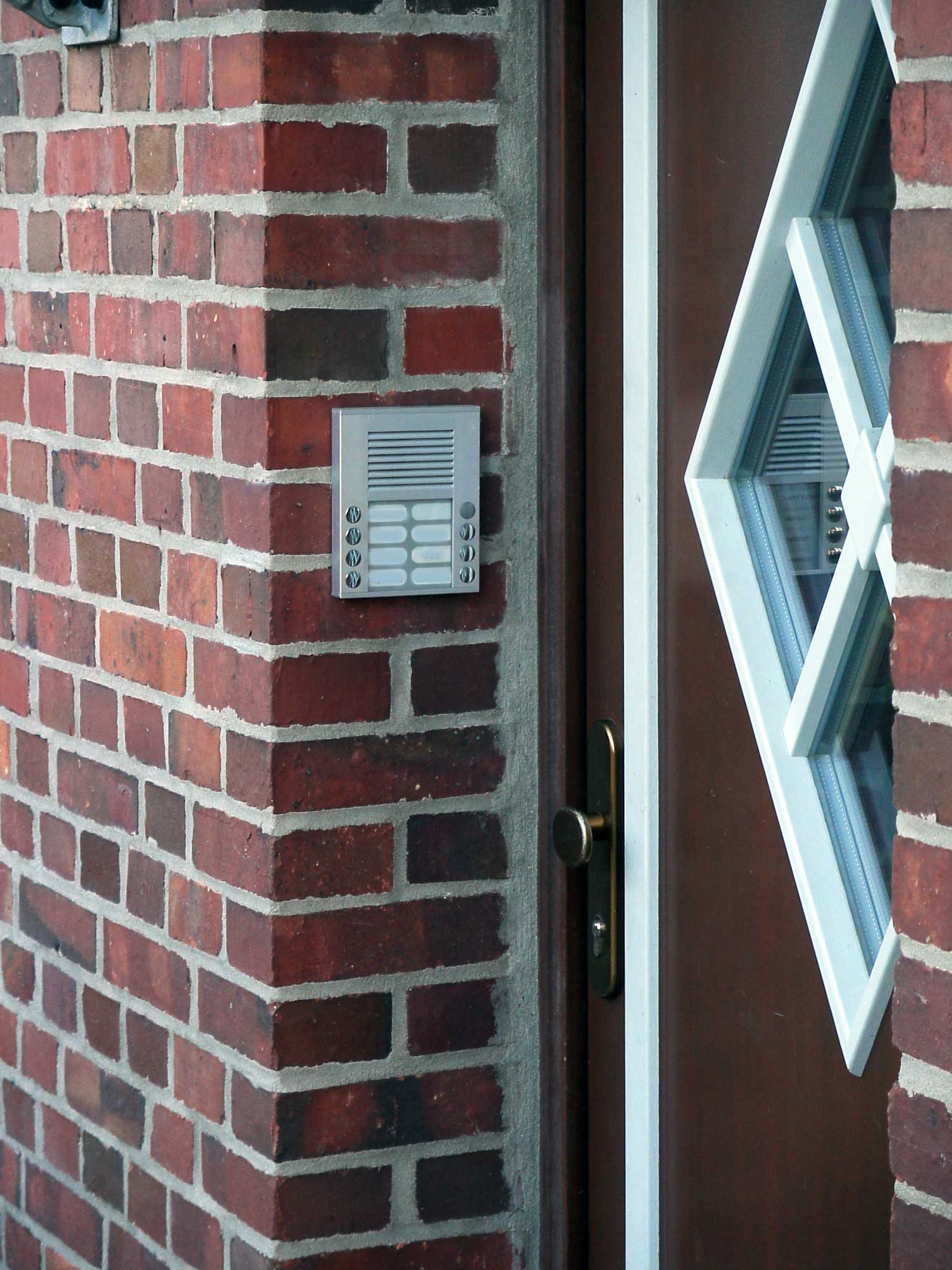 Hausklingelanlage außen